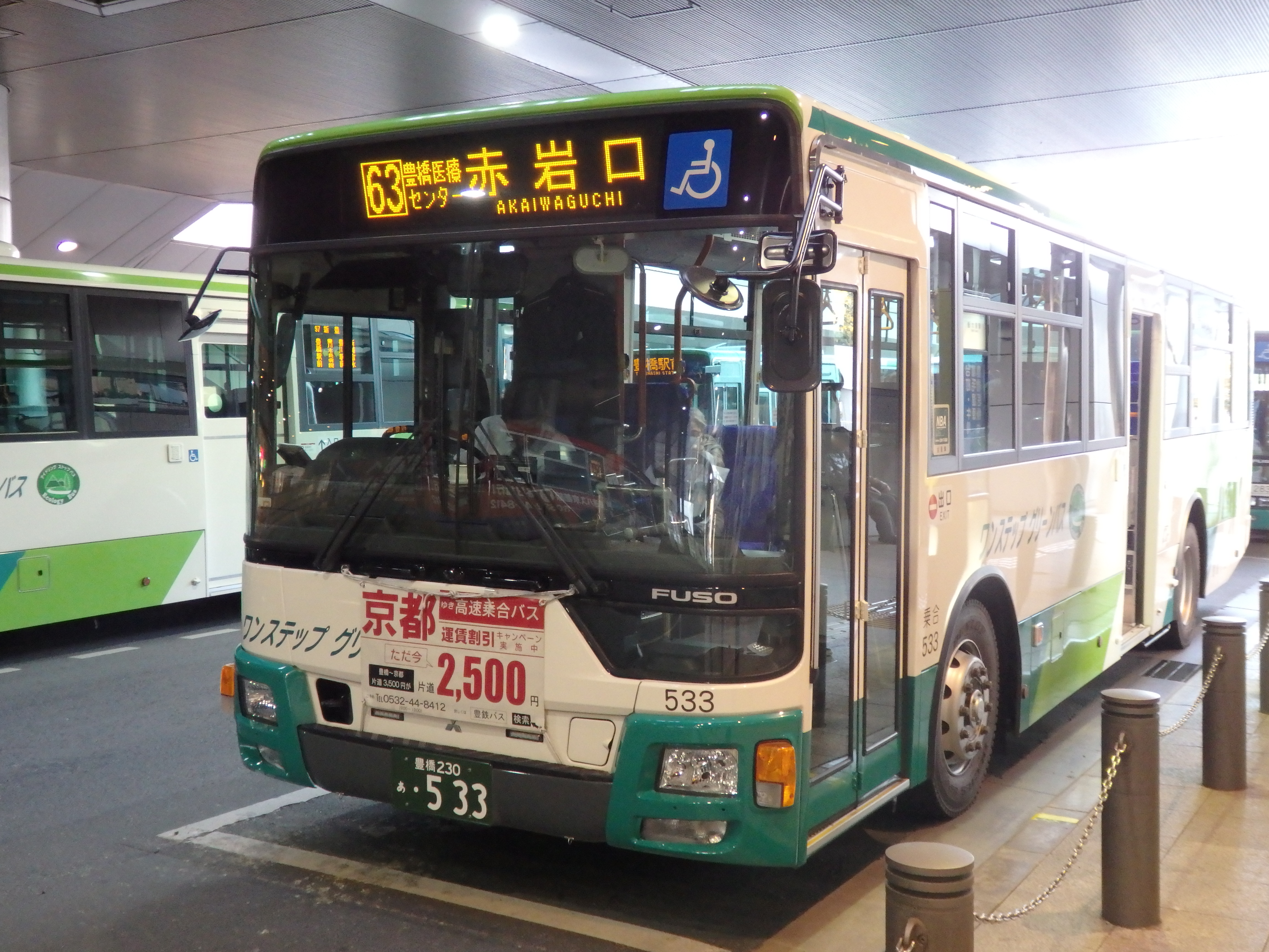 新城営業所所属乗合533